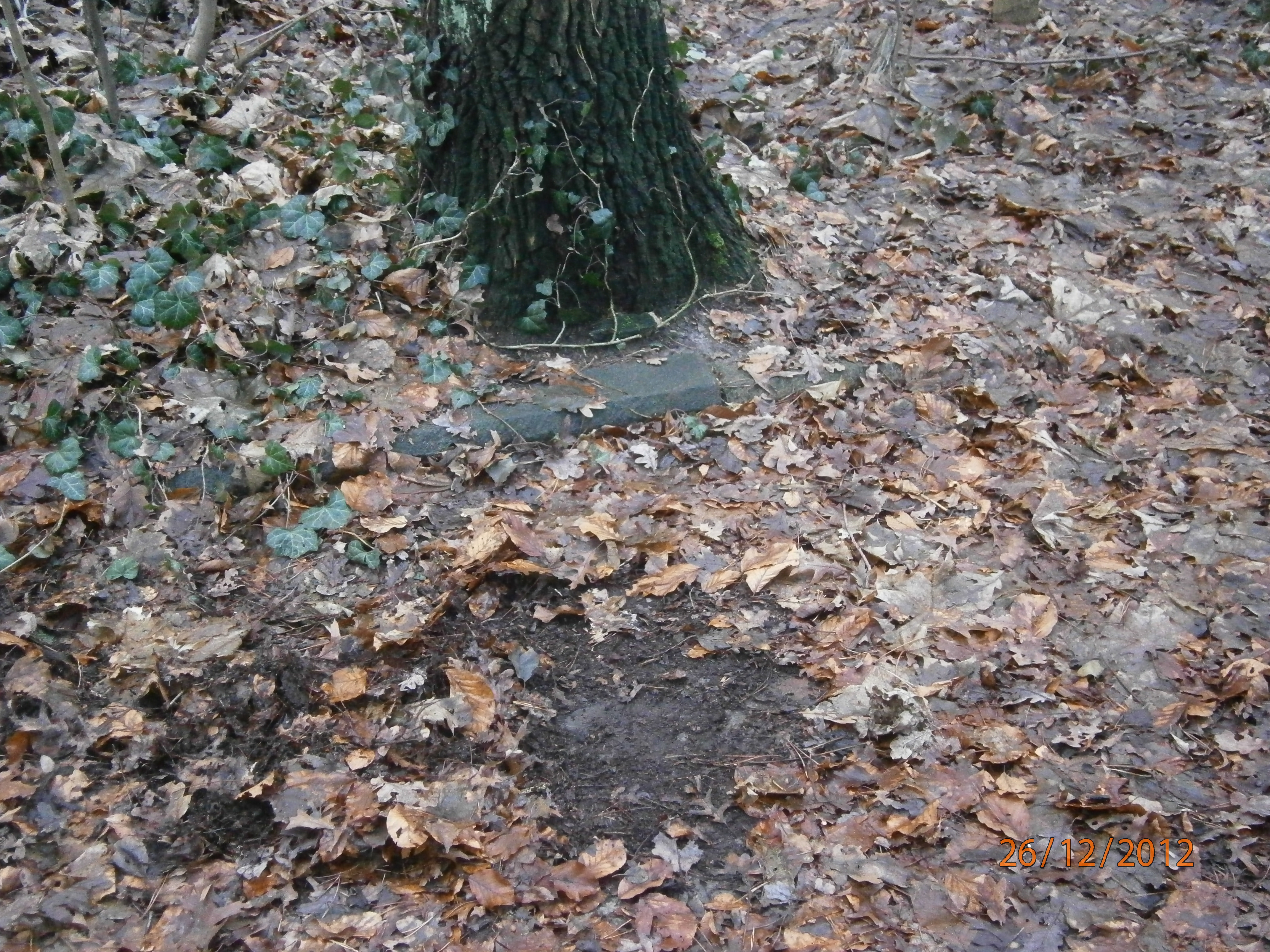 Bordsteinkante und Pflasterung am Waldweg des Hubertuswegs im Waldgelände Frohnau im Ortsteil Frohnau von BerlinStreets in Berlin-Frohnau